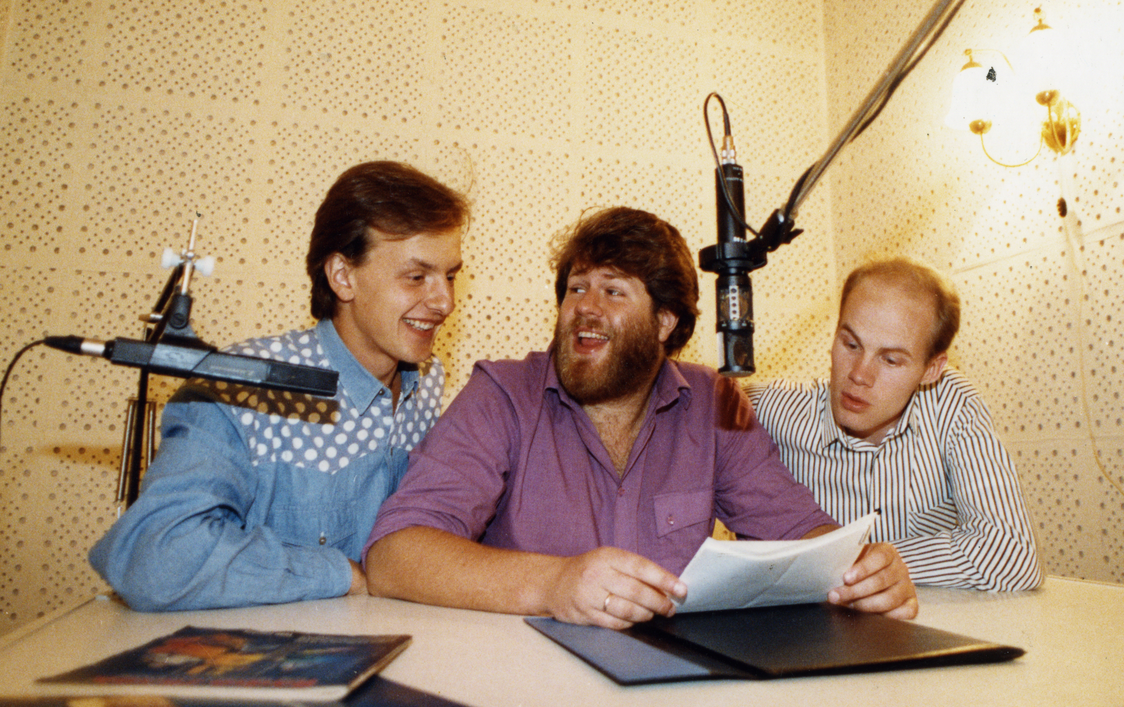 На фото (слева направо): Герман Янушпольский, Феликс Невелев, Сергей Букинич